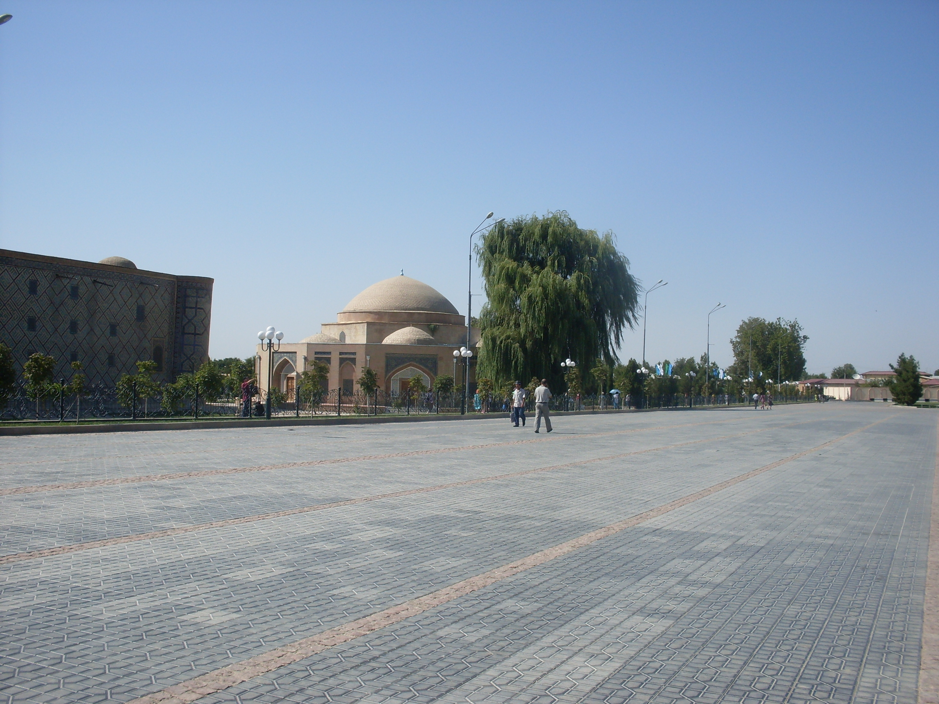 Street Tashkent Ancient trading dome Chorsu Древний торговый купол Чорсу